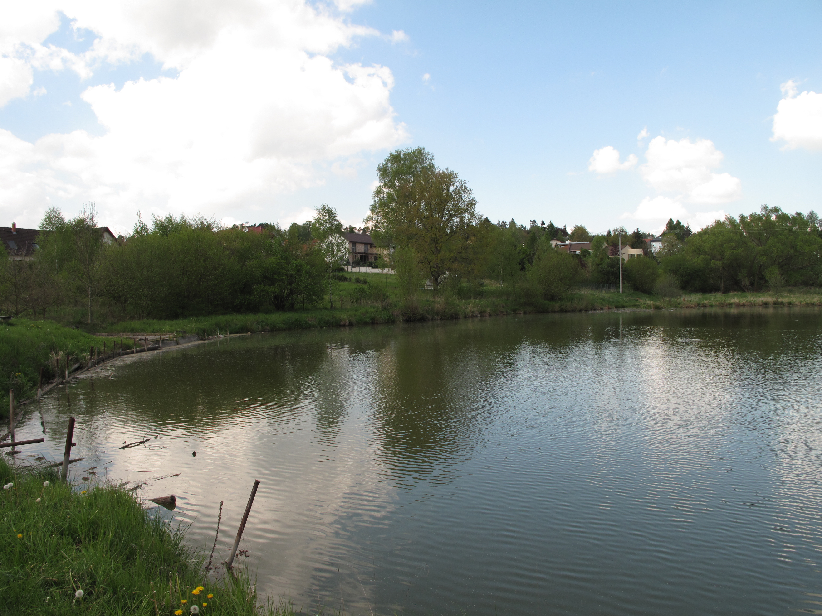 Rybník V Habří ve Velkých Popovicích. Okres Praha-východ, Česká republika.